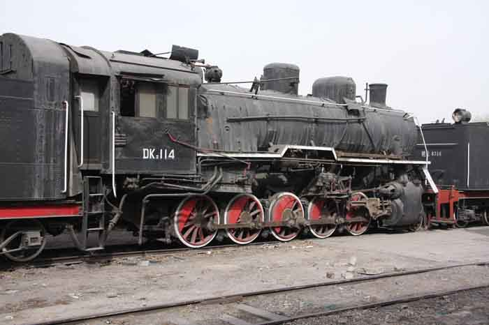 保存于呼和浩特铁路局包头西机务段的DK2型114号蒸汽机车